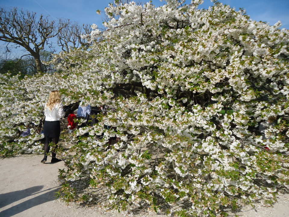 CERISIER JAPONAIS Prunus Groupe Sato-zakura 'Shirotae'